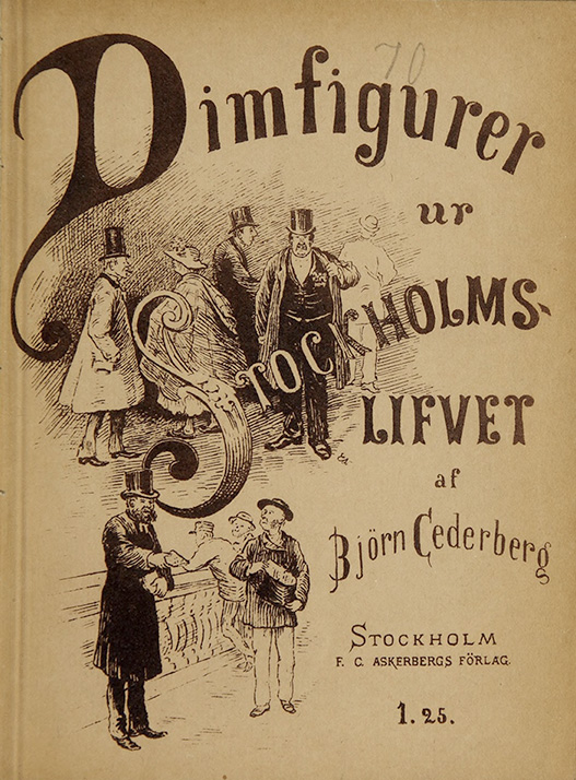 Book cover: Cederberg, Björn: Dimfigurer ur Stockholmslivet